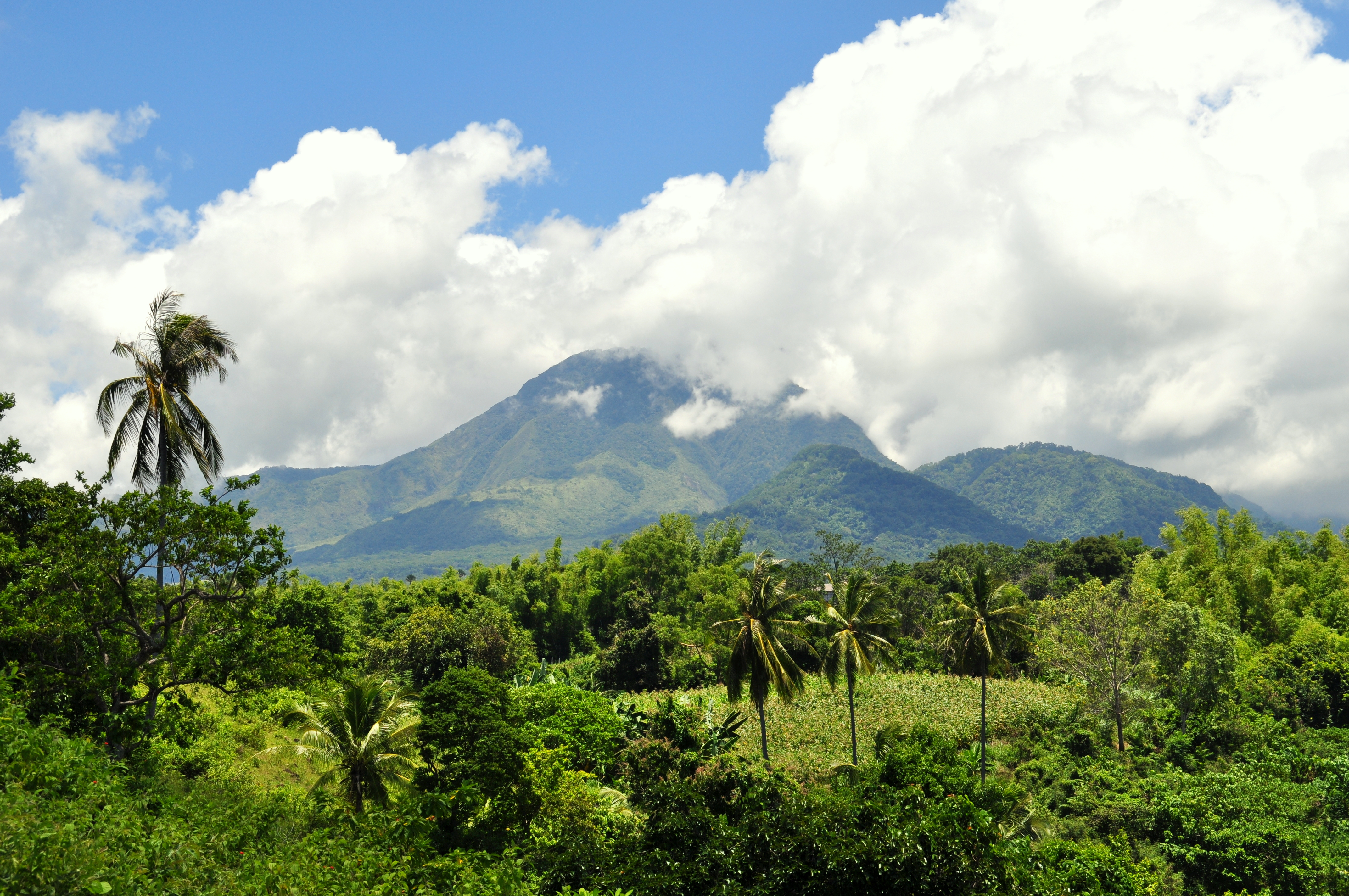 Photo d'un des sommets du volcan Talinis (Cuernos de Negros) prise depuis la municipalité de Dauin, au sud de Dumaguete